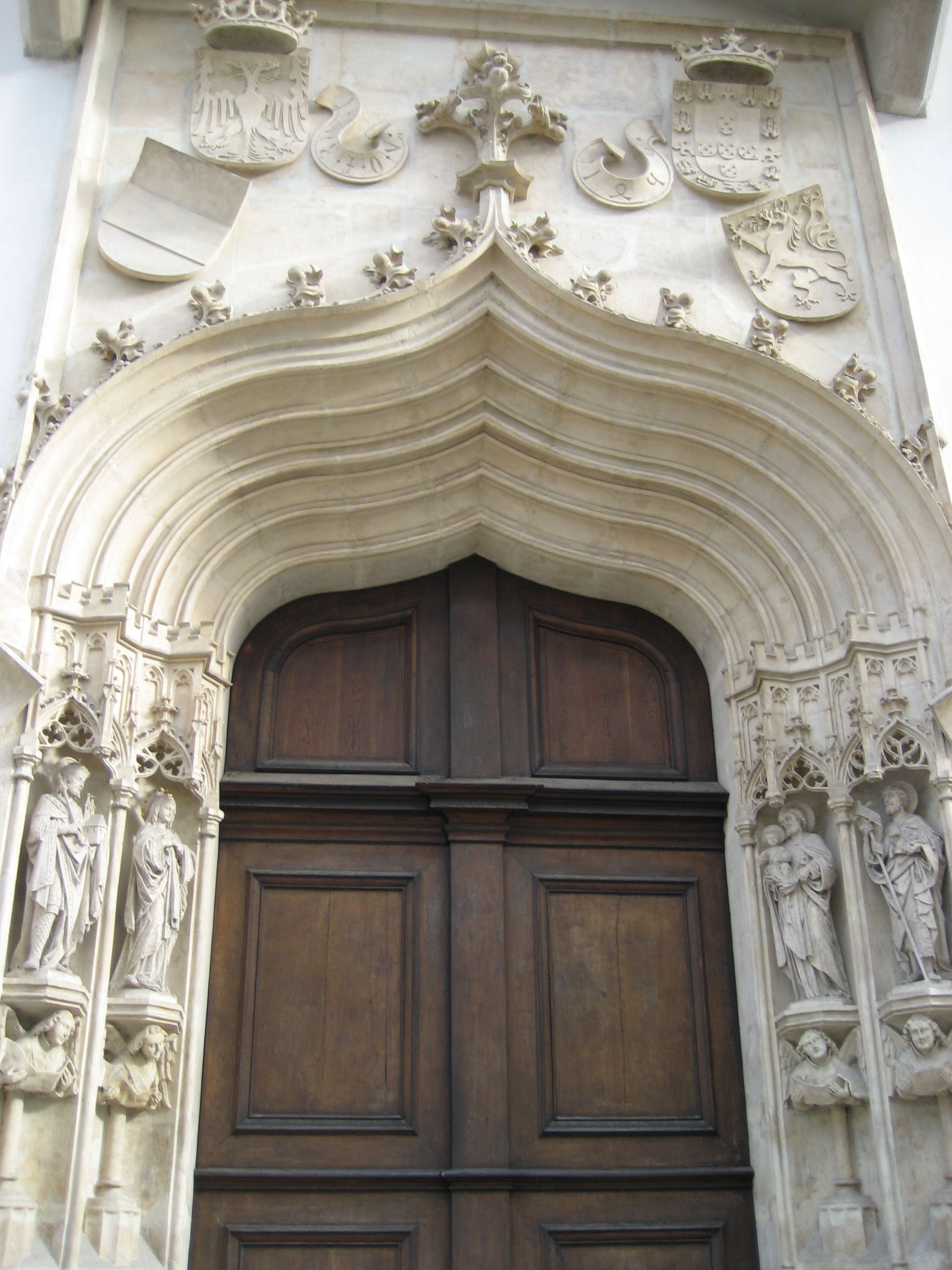 Grazer Dom, Dom zu Graz (Graz, Austria)